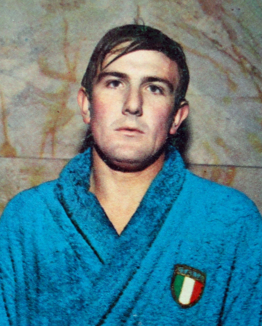 CAMPIONI DELLO SPORT 1968/69-n.248-FRANCO LAVORATORI-ITALIA